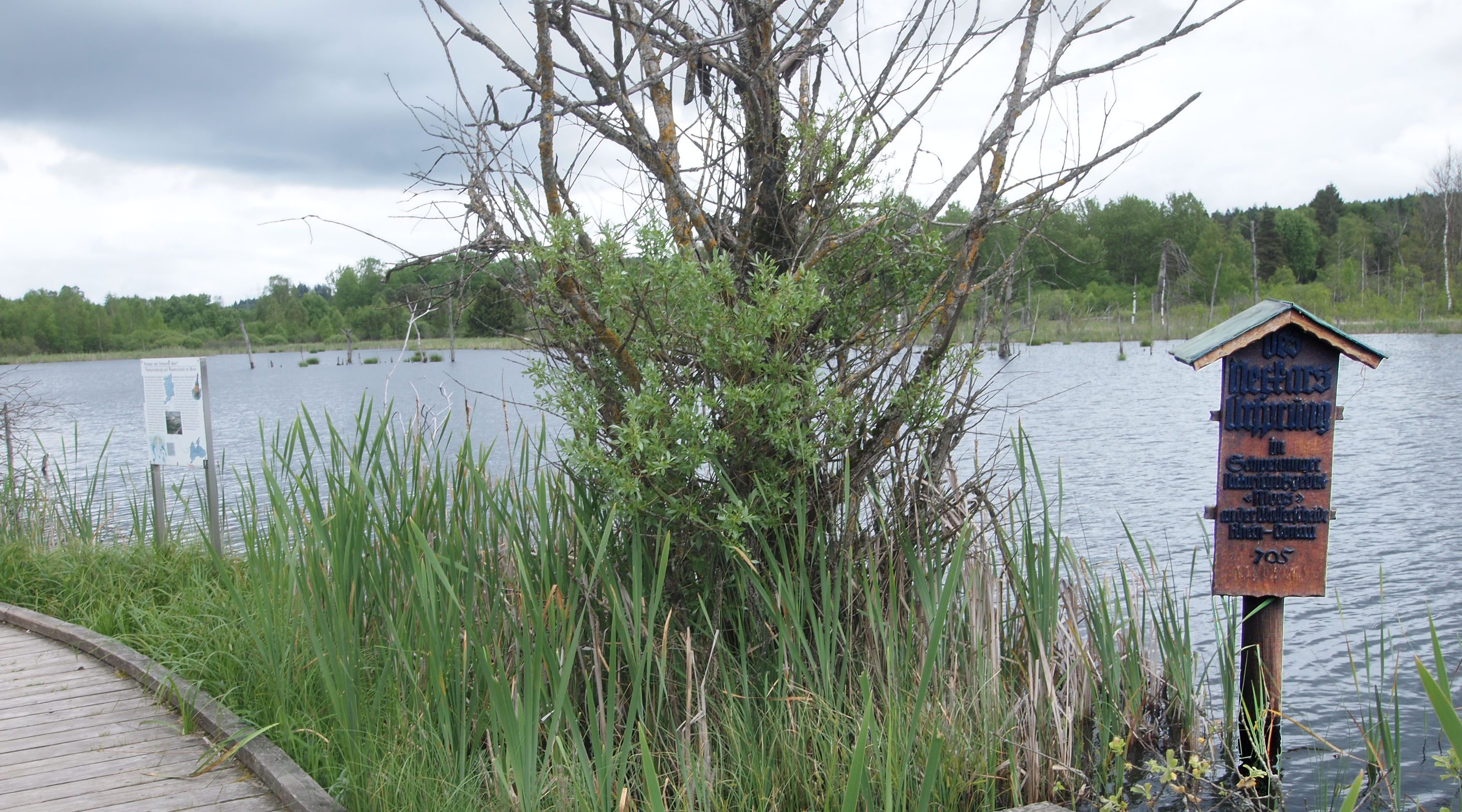 Torfstich-Weiher im Schwenninger Moos, auf der Europäischen Wasserscheide. Ursprung des Neckar